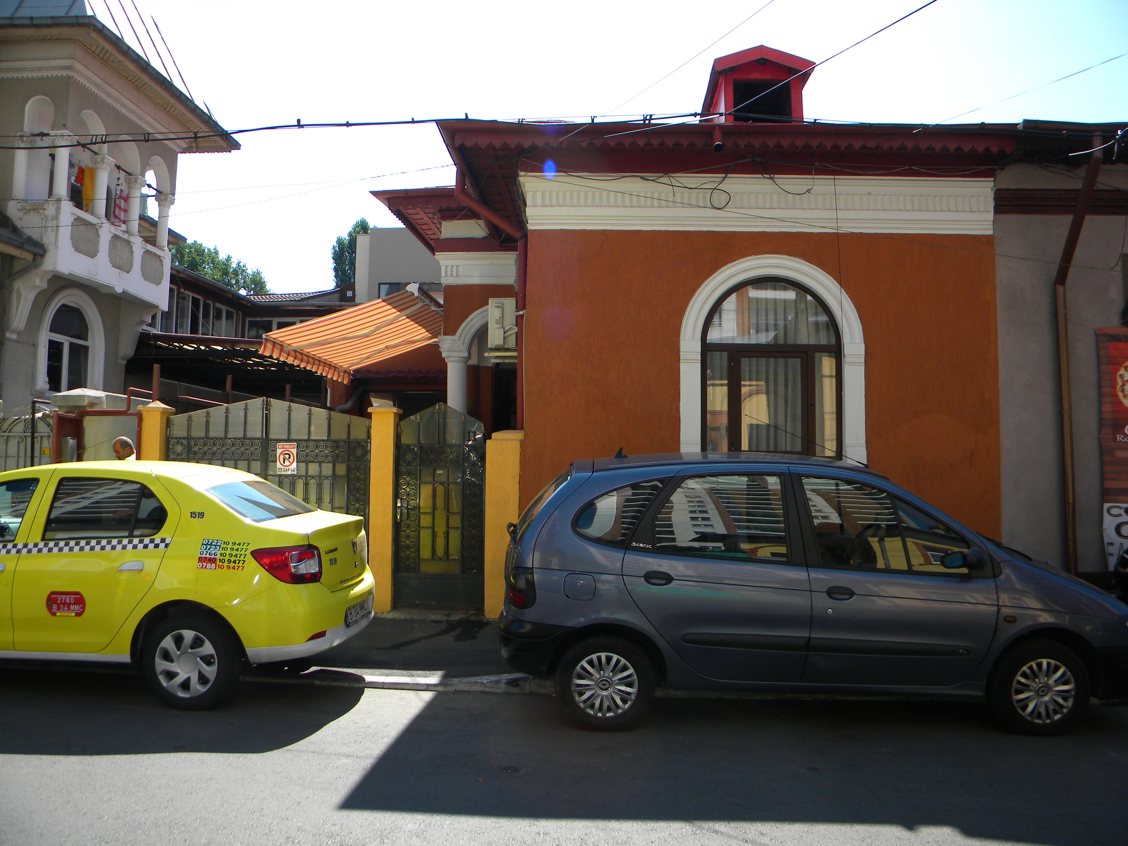 Bucuresti, Romania. Casa pe Str. Constantin Nottara nr. 11, sect. 3. B-II-m-B-19295